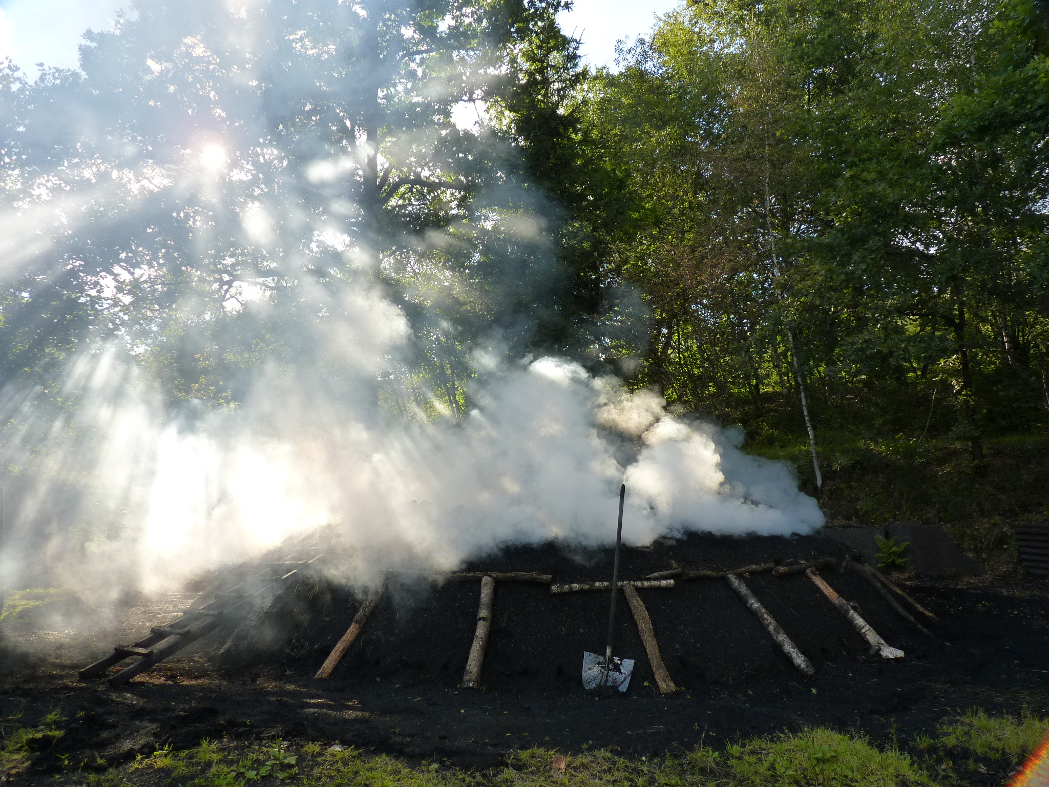 Rauchender Kohlenmeiler bei Walpersdorf